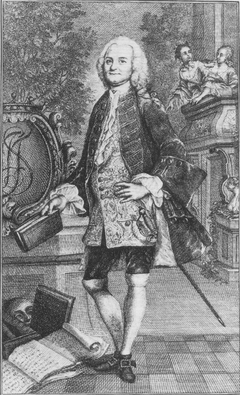 Johann Friedrich Schönemann (1704-1783), deutscher Schauspieler und Theaterdirektor